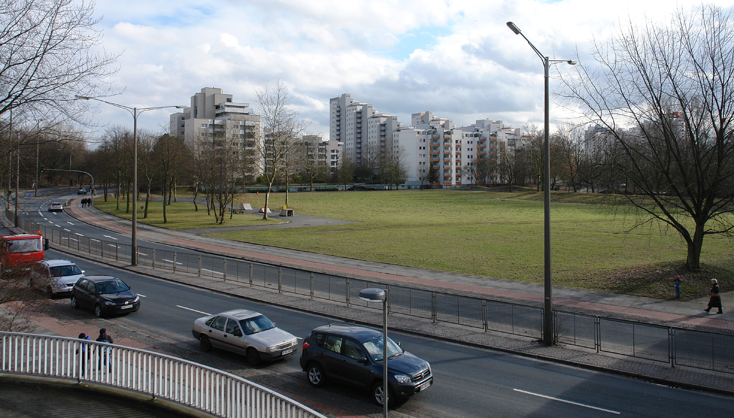 Bremen-Tenever: Otto-Brenner-Allee und Häuser am Pfälzer Weg. Die Freifläche davor ist durch Abriss einiger Häuser ab 2004 entstanden